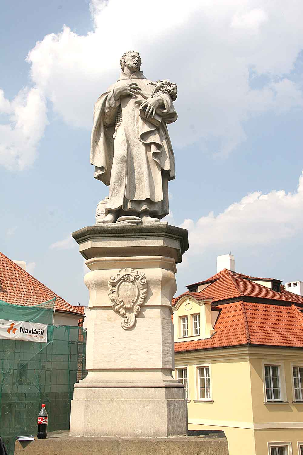 Sousoší Svatého Filipa Benicia na Karlově mostě